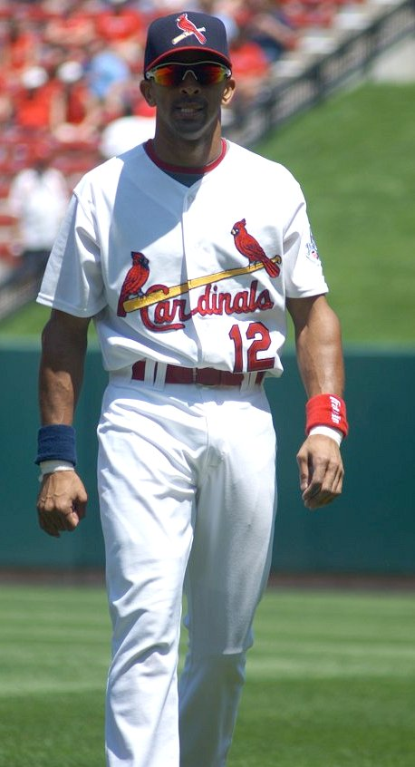 Julio Lugo